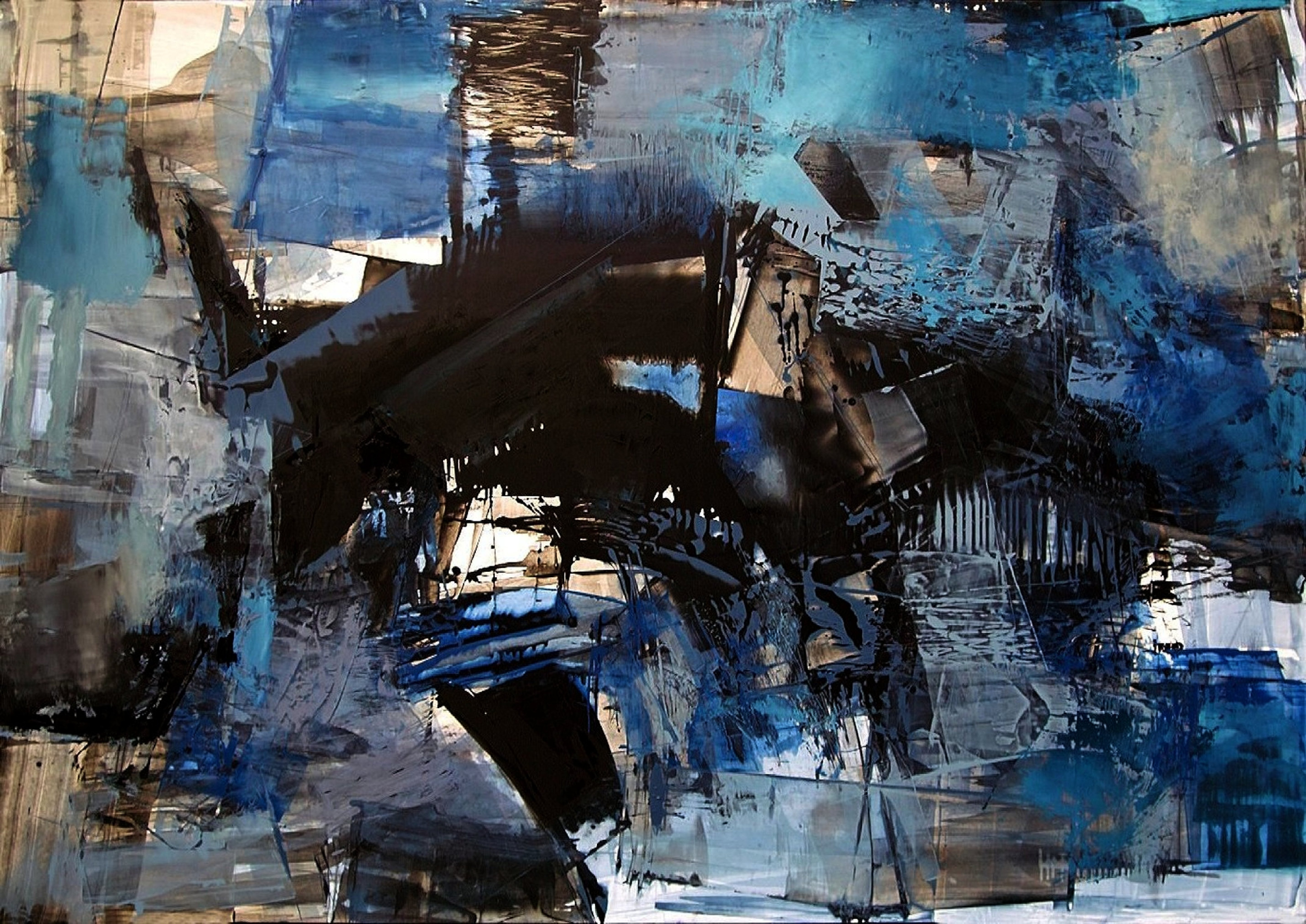 Dieter Crumbiegel, Bild 11-14, 140x200 cm, 2018